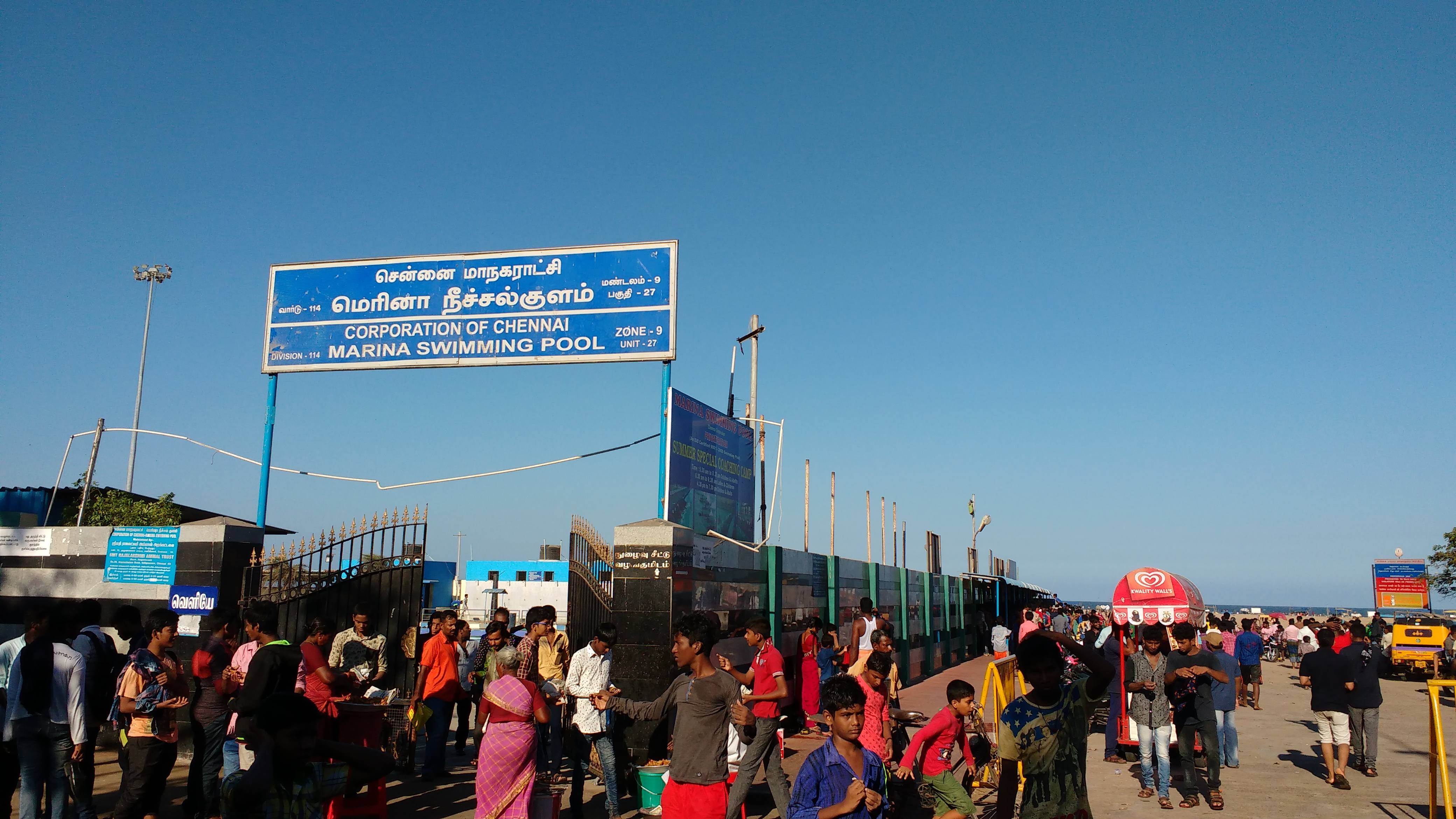 மெரினாவின் நீச்சல் குள முகப்பு